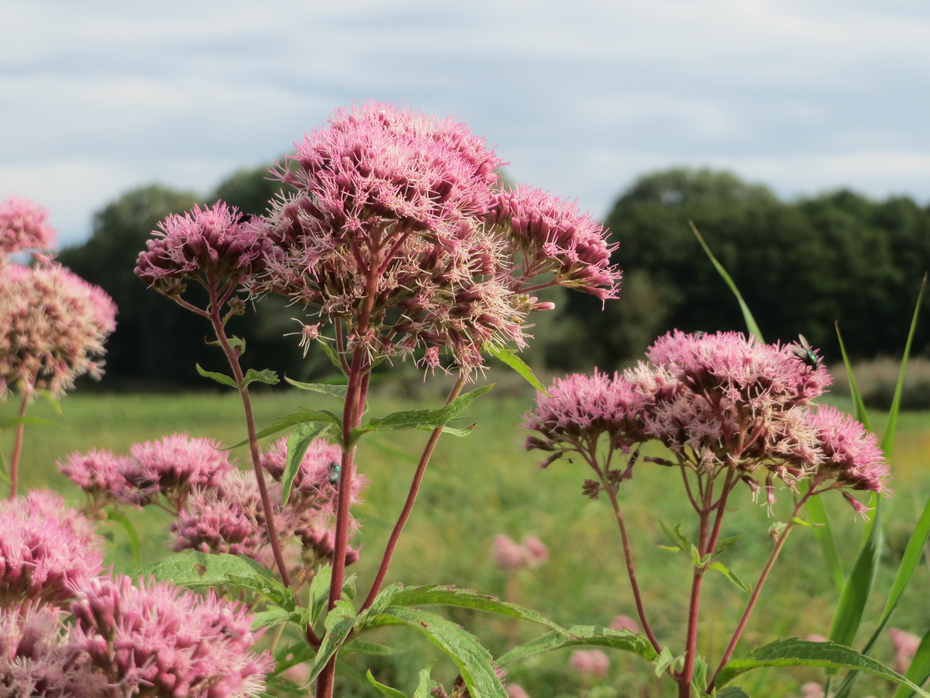 Gewöhnlicher Wasserdost (Eupatorium cannabinum) im Hockenheimer Rheinbogen